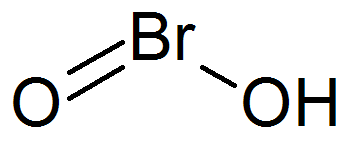 Struktur der Bromigen Säure